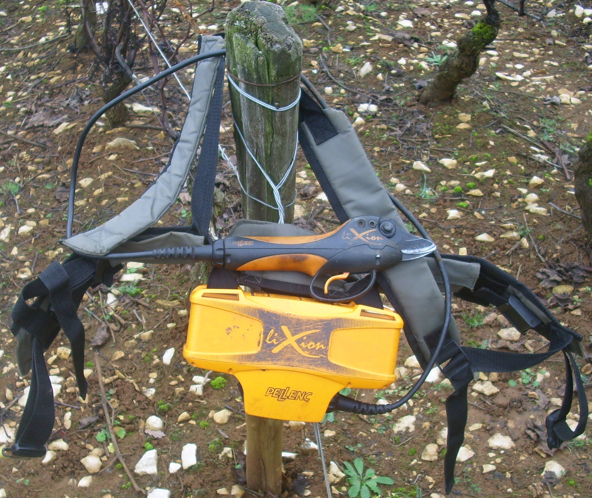 Elektrische Rebschere mit Akku und Tragegestell